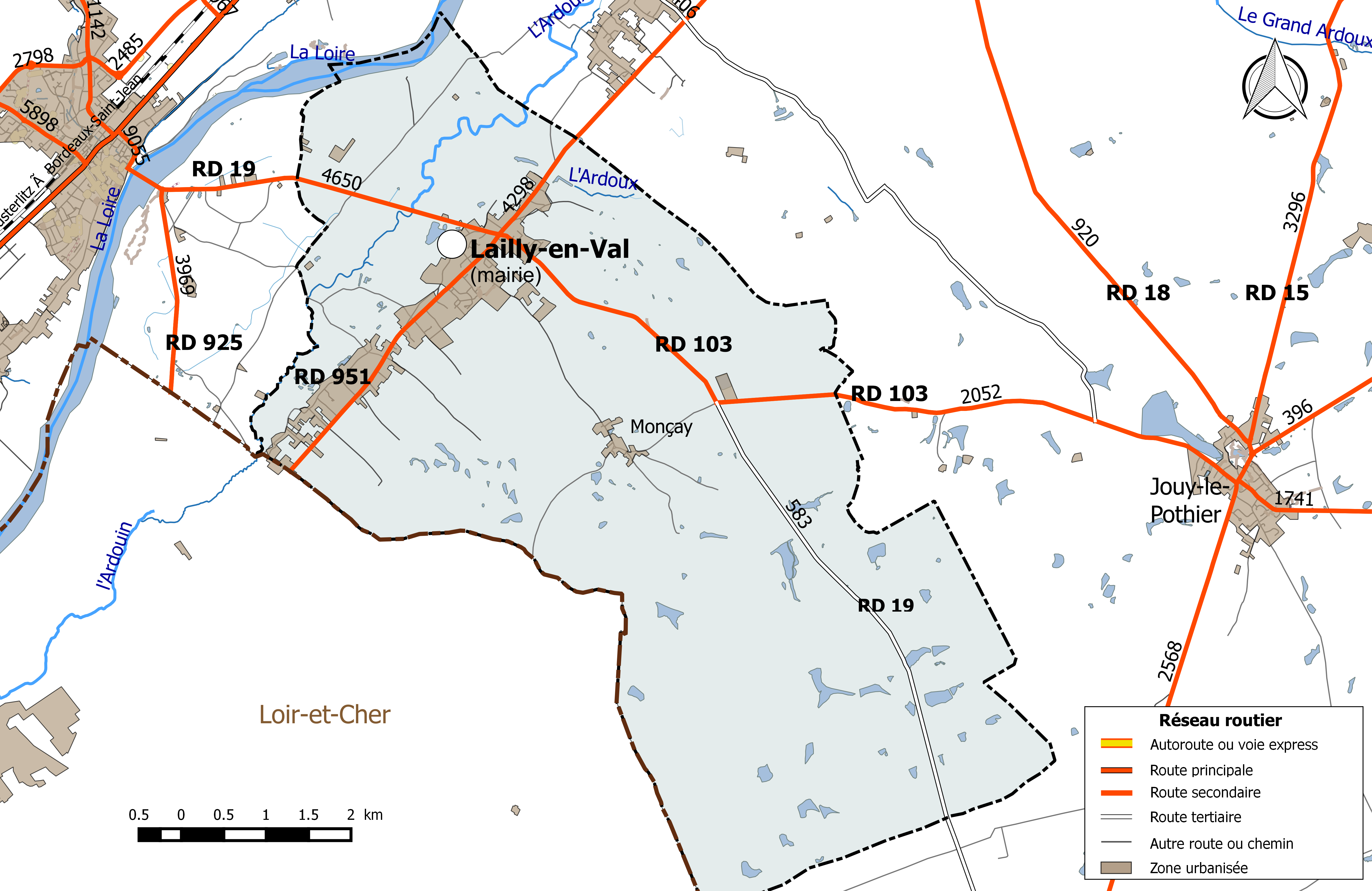 Carte du réseau routier de la commune de Lailly-en-Val.